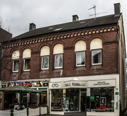 Stolpersteine Dortmund